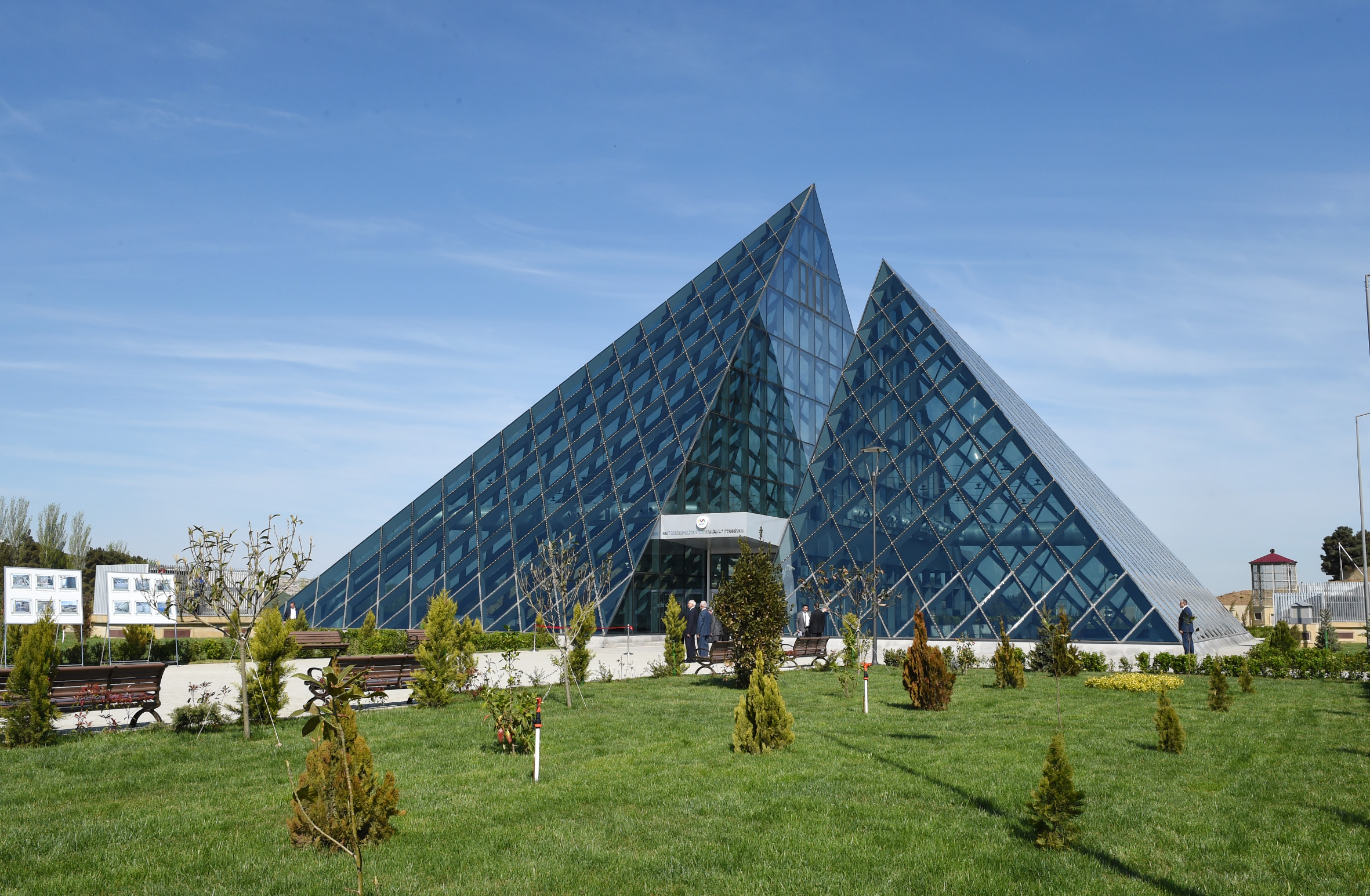 Avtovağzal stansiyası